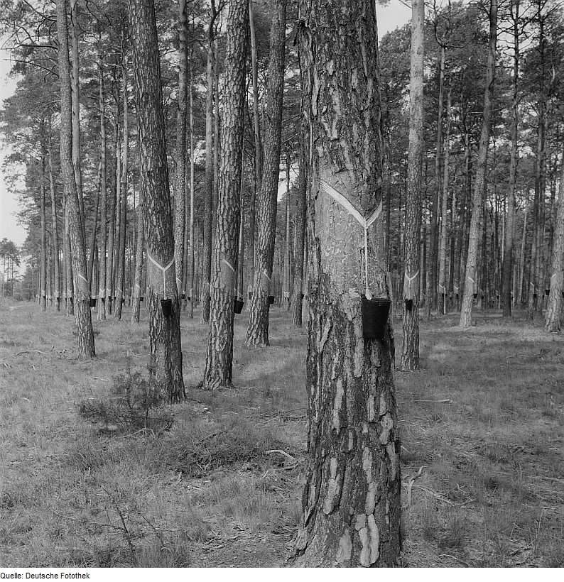 Original image description from the Deutsche Fotothek Harzen von Kiefern